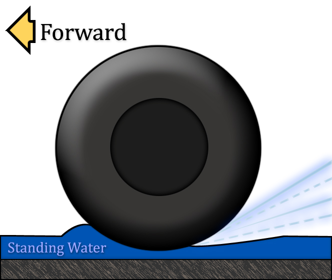 Hydroplaning (Aquaplaning)